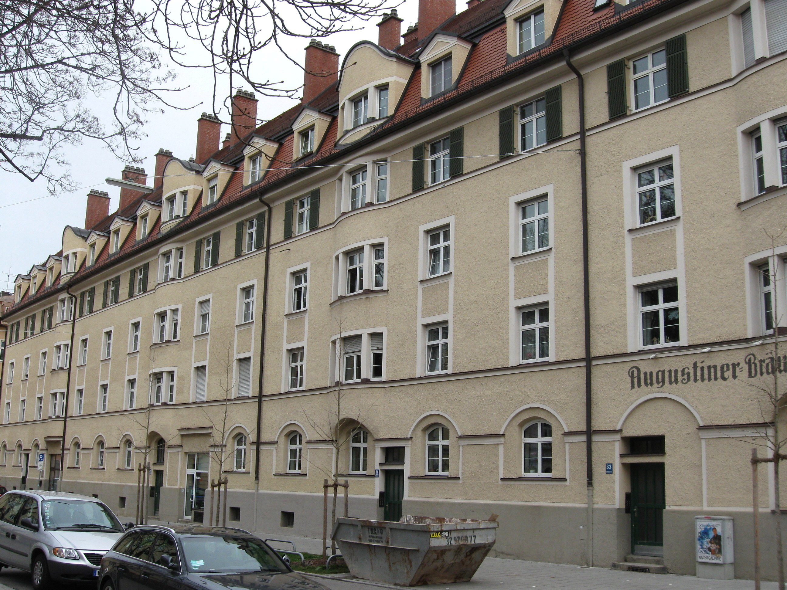 Bergmannstraße 27/29/31/33; Teil einer Wohnanlage, 1920–22 von Ludwig Naneder, siehe Gollierstraße 54/56/56 a/56 b.